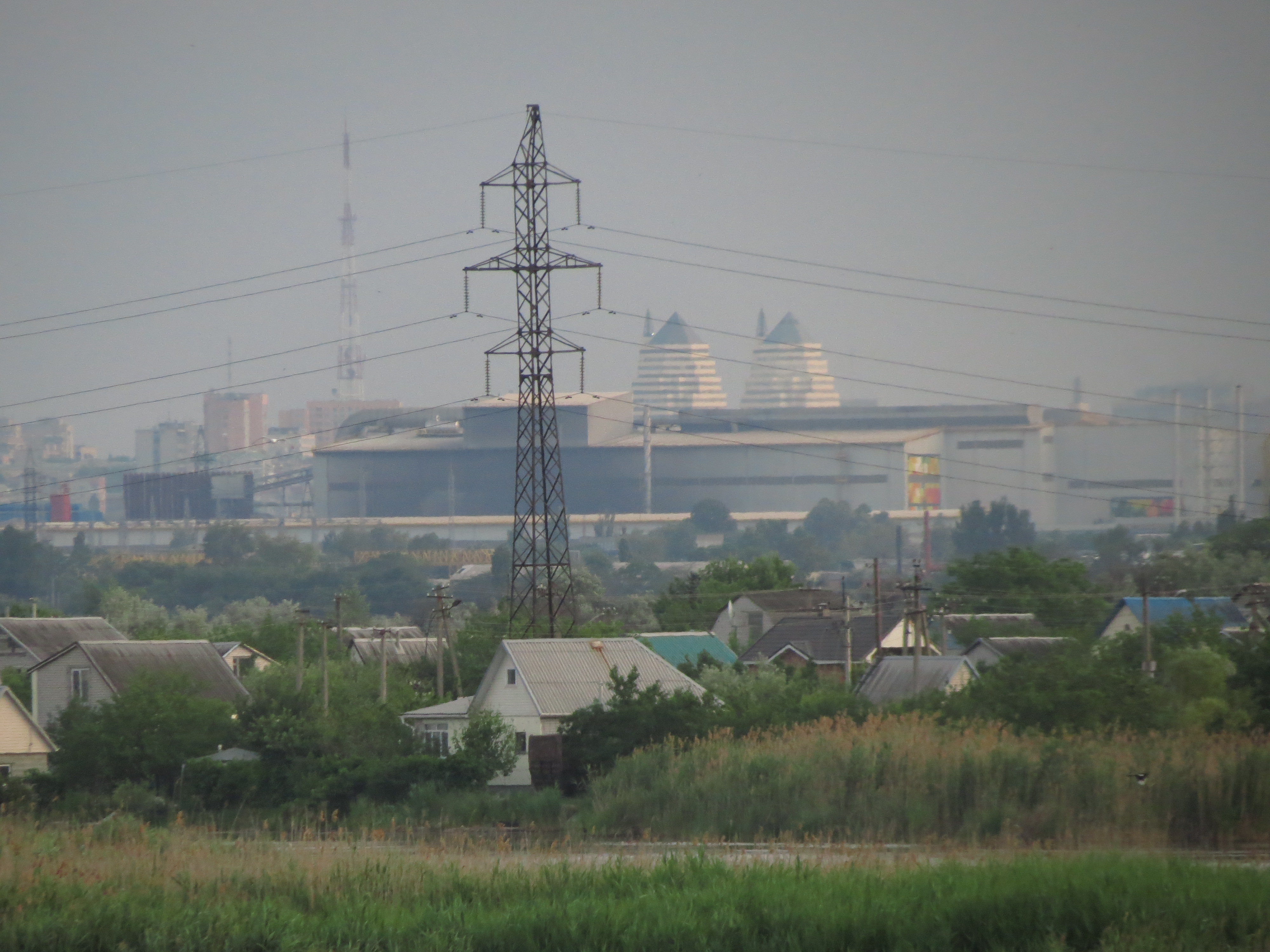 Pidhorodne, Dnipropetrovsk Oblast, Ukraine